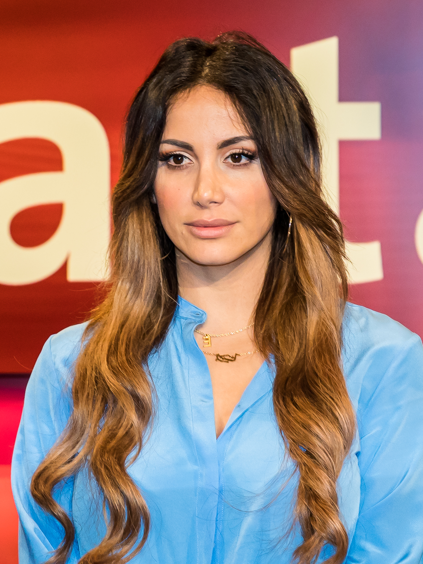 Hart aber fair, Sendung vom 9. April 2018. Frank Plasberg diskutiert das Thema: "Islam ausgrenzen, Muslime integrieren – kann das funktionieren?" Foto: Enissa Amani, Comedian, Schauspielerin und Moderatorin